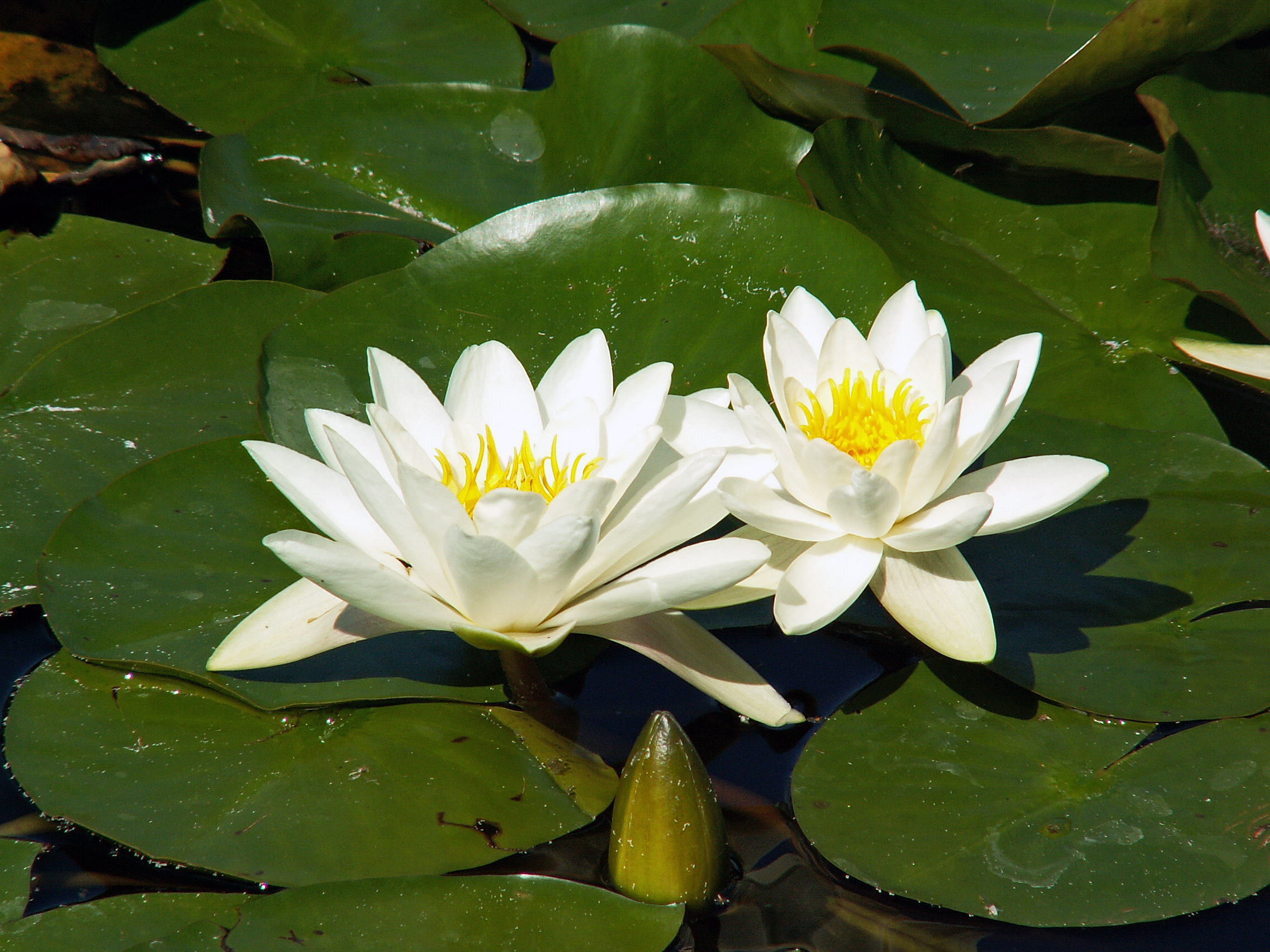 Nymphaea alba